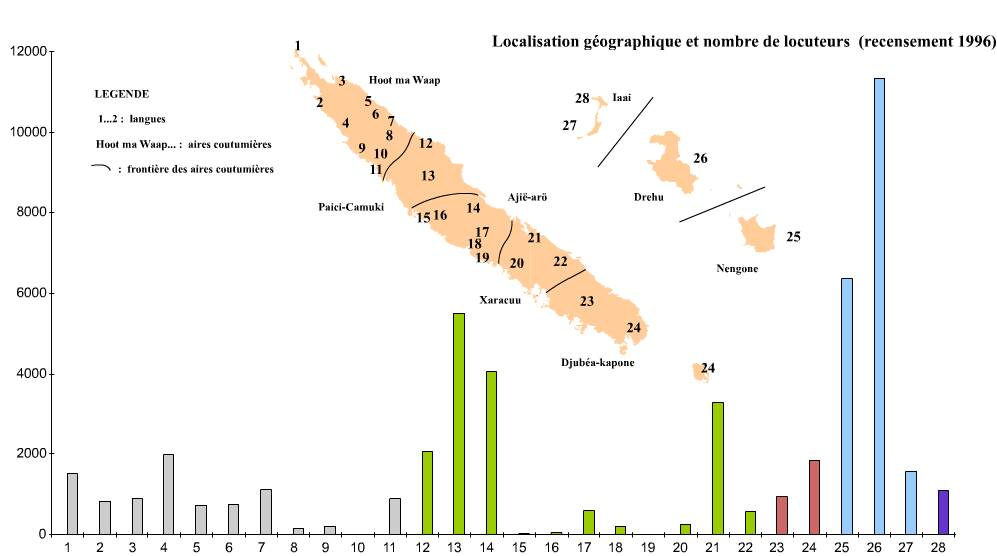 Carte des langues kanak (localisation et nombre de locuteurs)